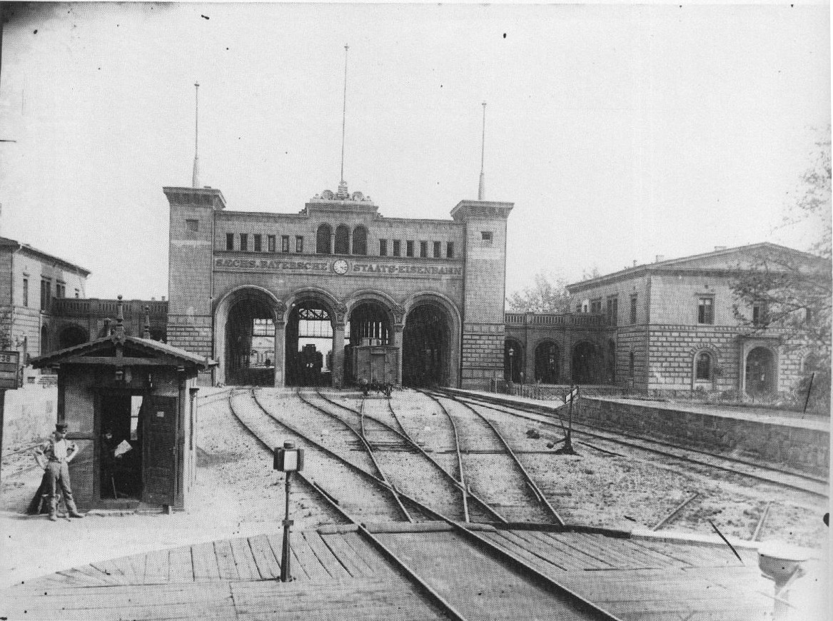 Bayerischer Bahnhof in Leipzig, Bayrischer Platz Nr. 1 um 1890.